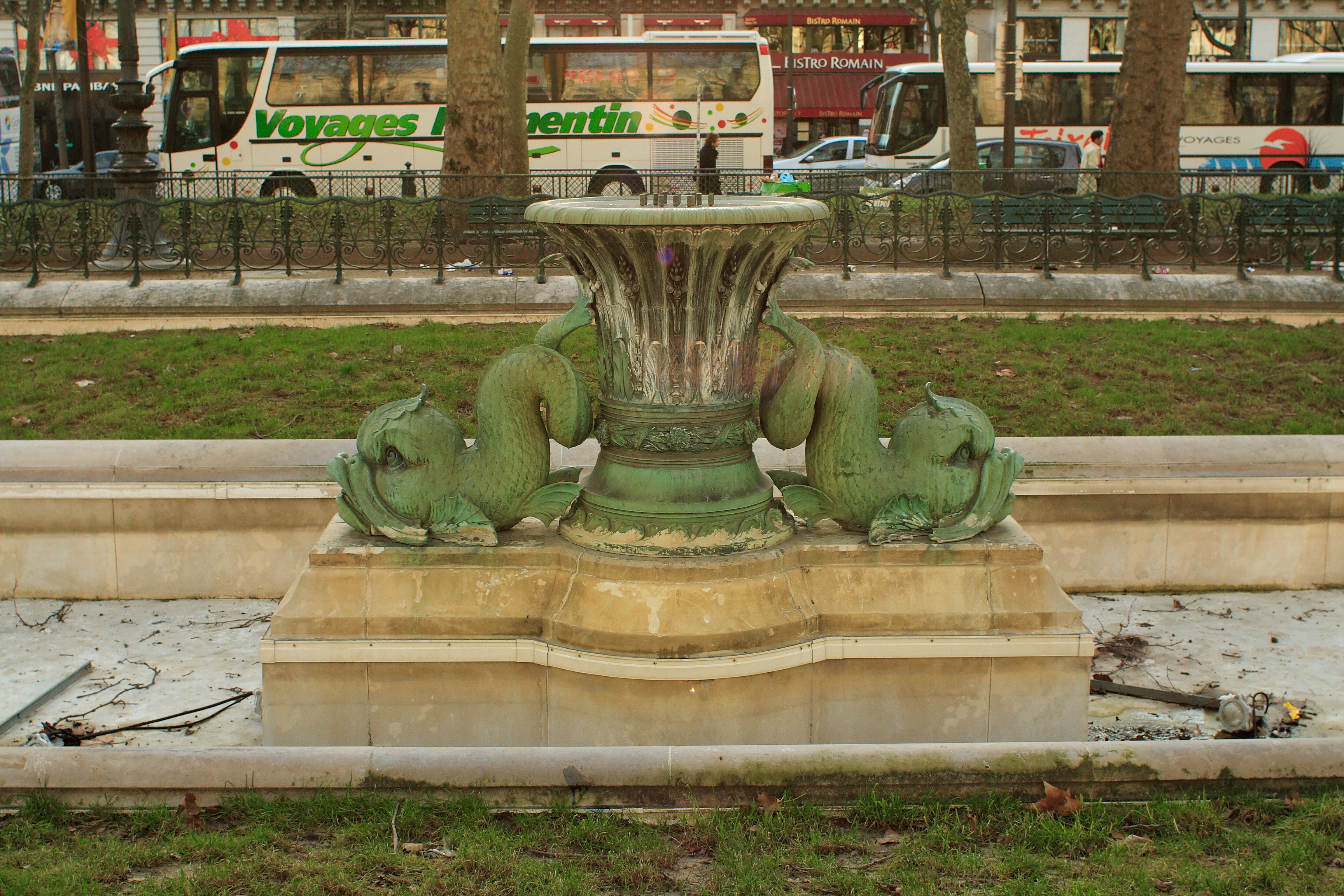 Une des deux fontaine aux dauphins de la place de la République (Paris)